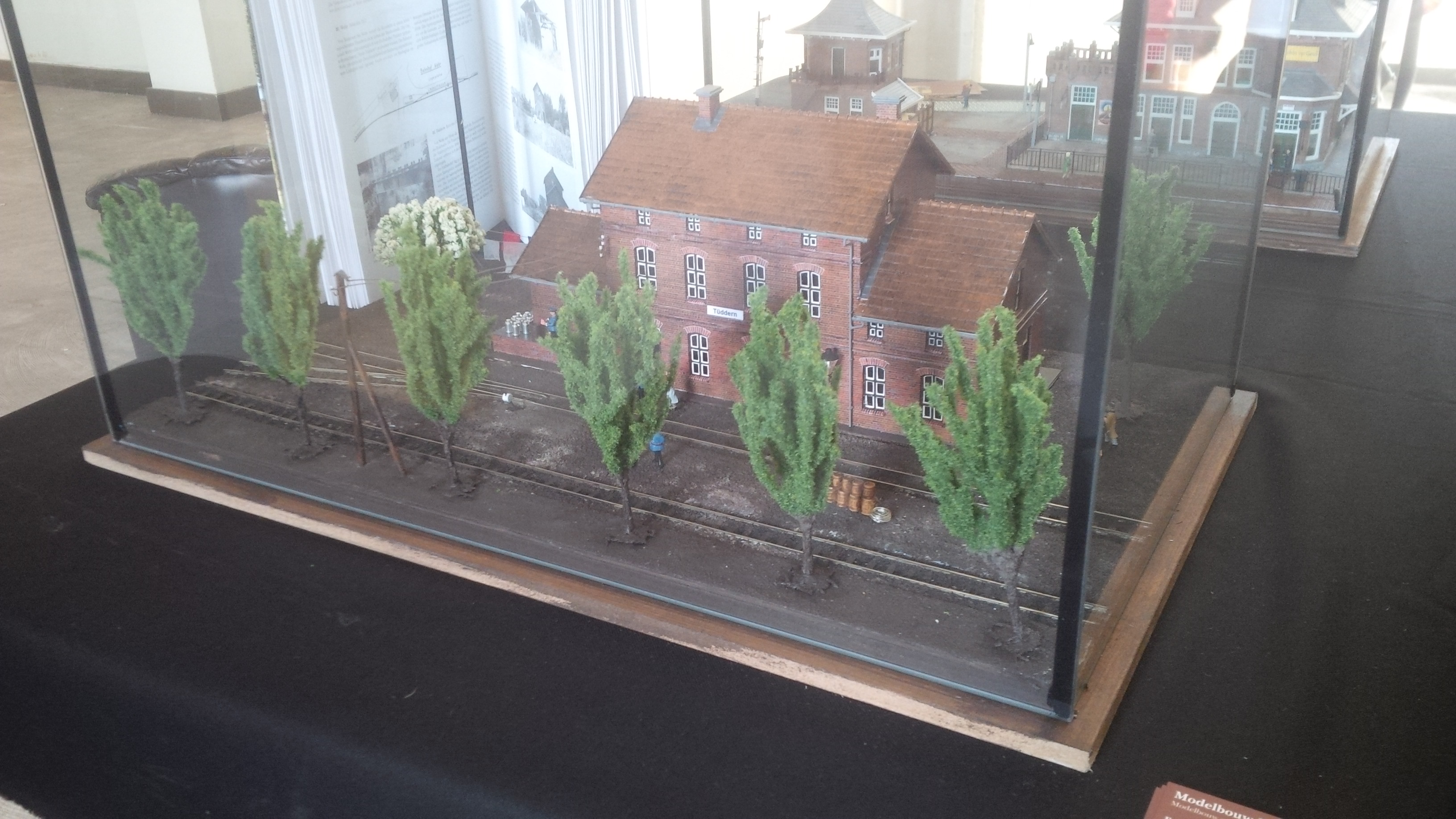 Altes Bahnhofgebäude als Modellbau in Selfkant Tüddern